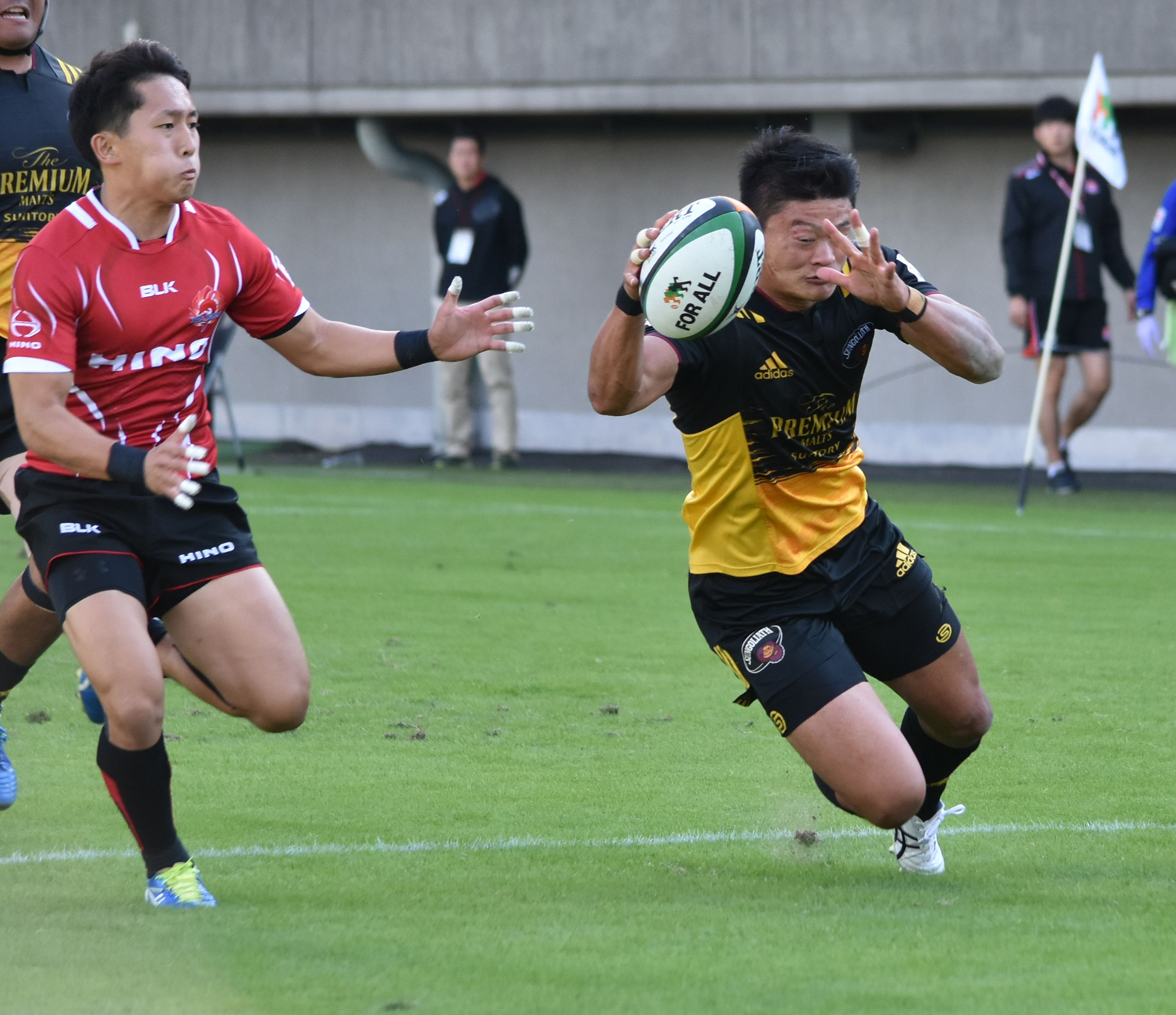 村田 大志